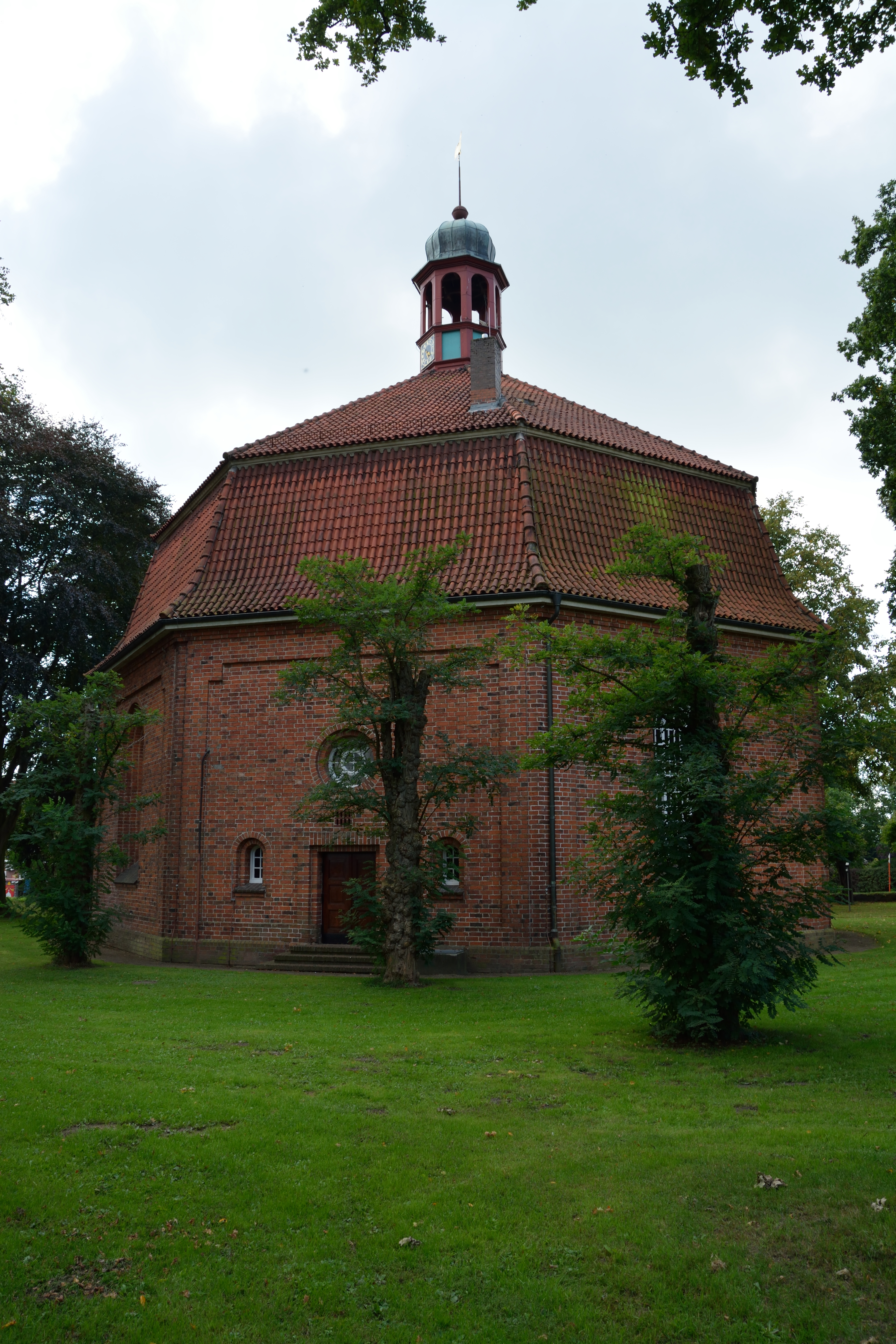 Kirche